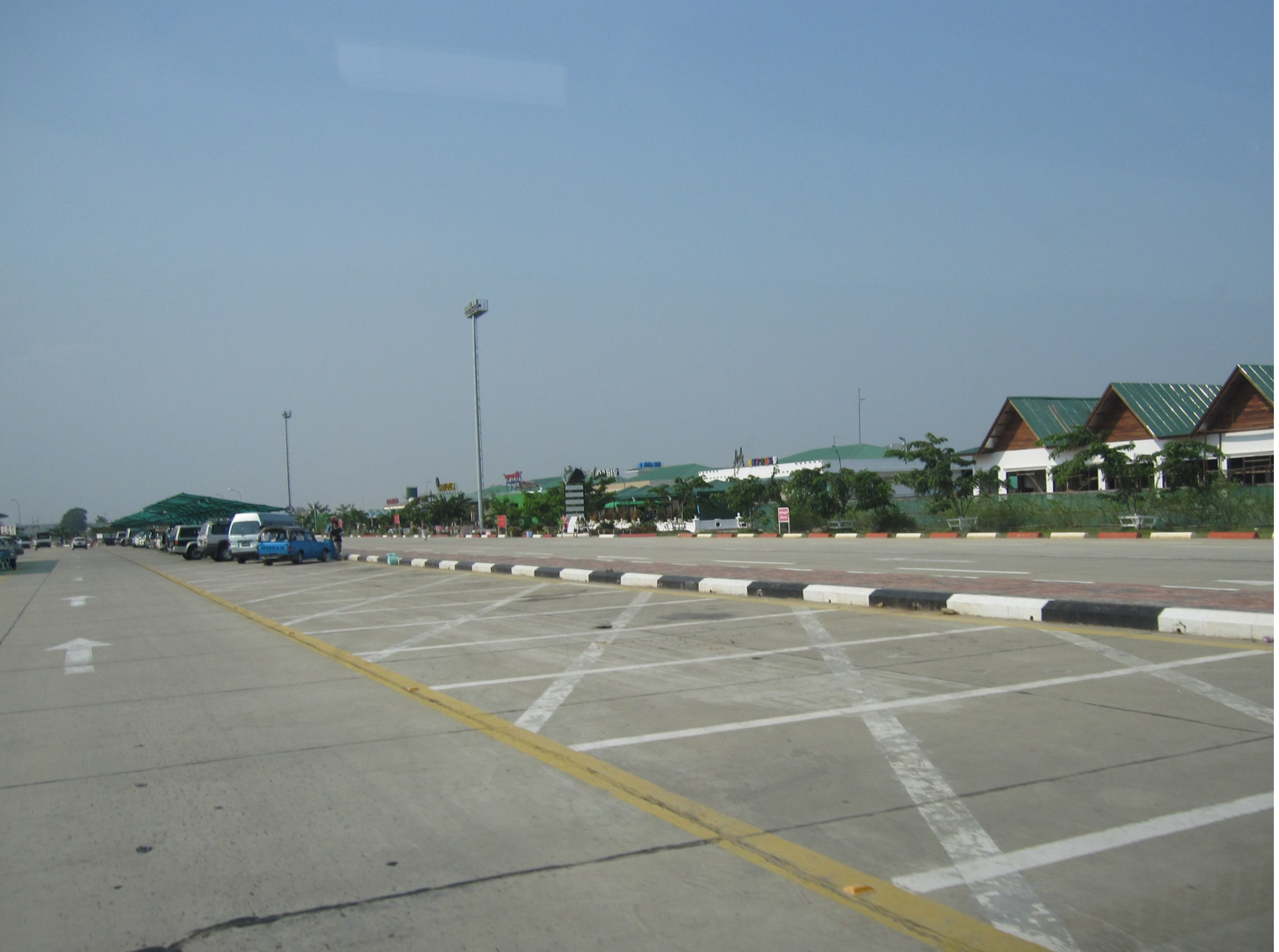 115miles Rastanlage / Yangon-Mandalay Expressway